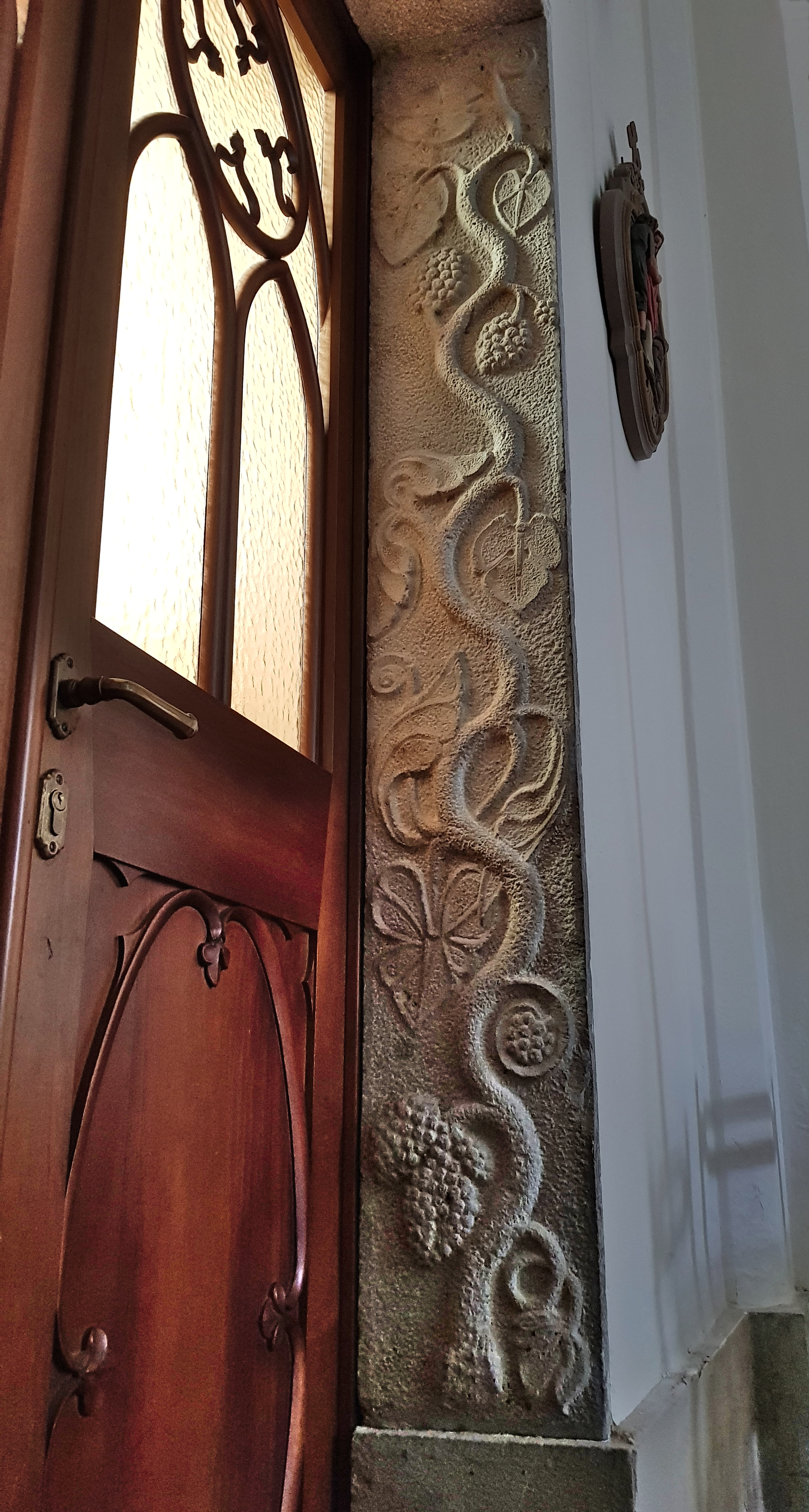 Stipite della Sacrestia (nord), Parte dell'antica chiesa di Santa Maria dei Colli (sec. XIII) - Chiesa di Santo Spitito, Ospedaletto di Gemona (UD) Italy